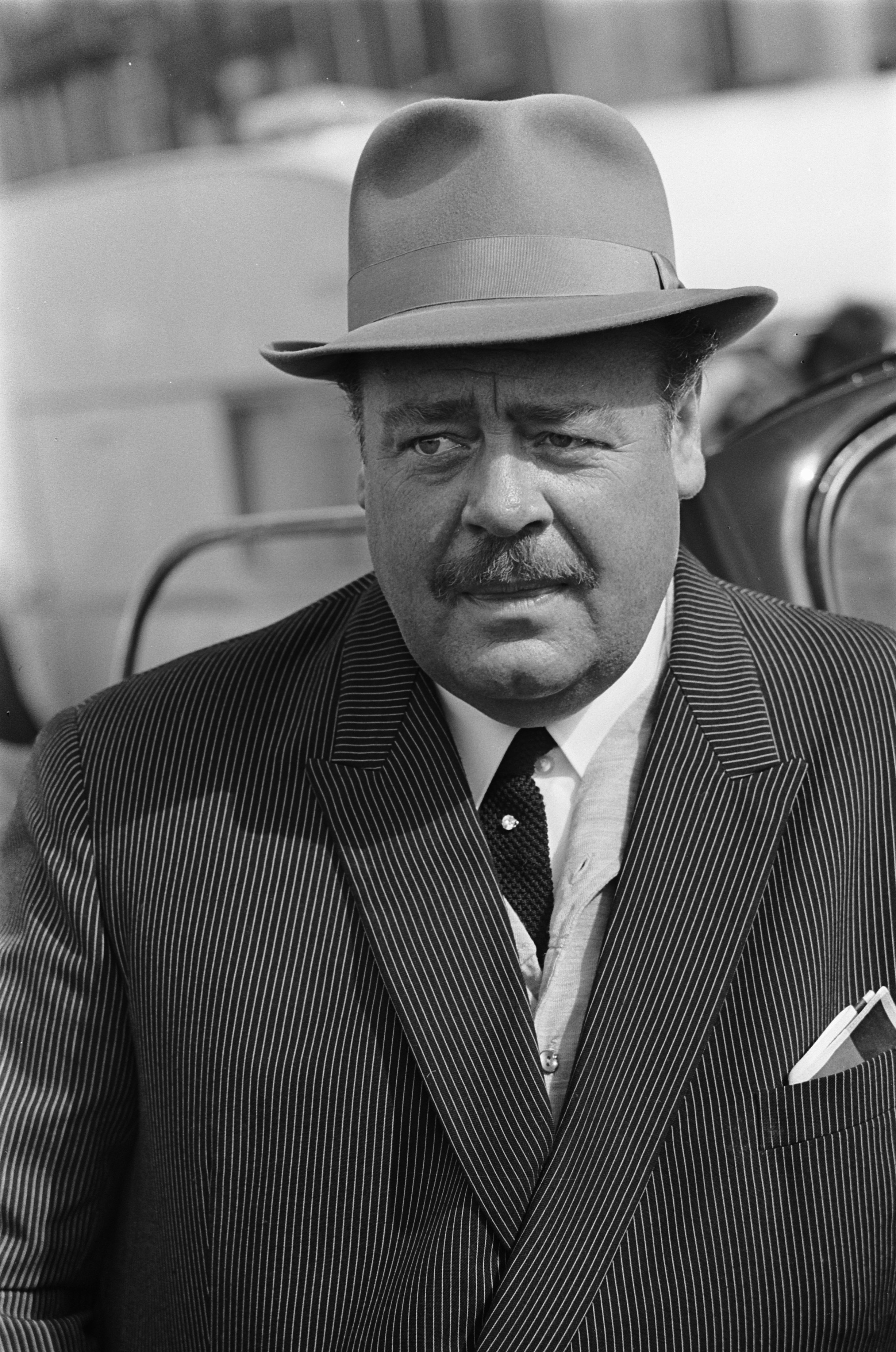 Collectie / Archief : Fotocollectie Anefo Reportage / Serie : [ onbekend ] Beschrijving : Moef-Ga-Ga in Kattenburg (Amsterdam), Paul Wilking beter bekend als "Pistolen Paultje" Datum : 22 maart 1968 Locatie : Amsterdam, Noord-Holland Trefwoorden : criminelen, portretten, televisieprogramma's, werkopnamen Persoonsnaam : Wilking, Paul Fotograaf : Nijs, Jac. de / Anefo Auteursrechthebbende : Nationaal Archief Materiaalsoort : Negatief (zwart/wit) Nummer archiefinventaris : bekijk toegang 2.24.01.05 Bestanddeelnummer : 921-1870